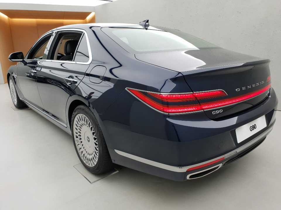 GENESIS G90 후측면